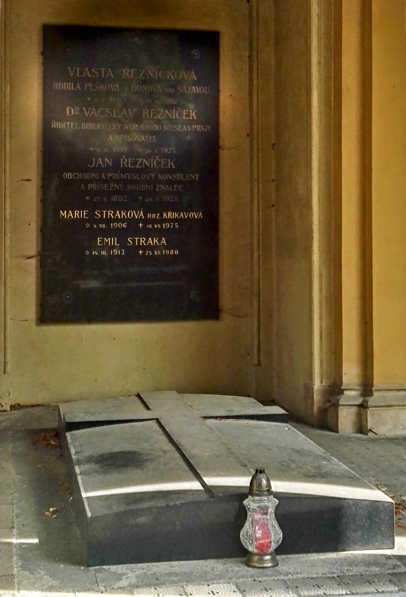 Hrob Václava Řezníčka, Vinohradský hřbitov v Praze, jižní strana kaple sv. Václava